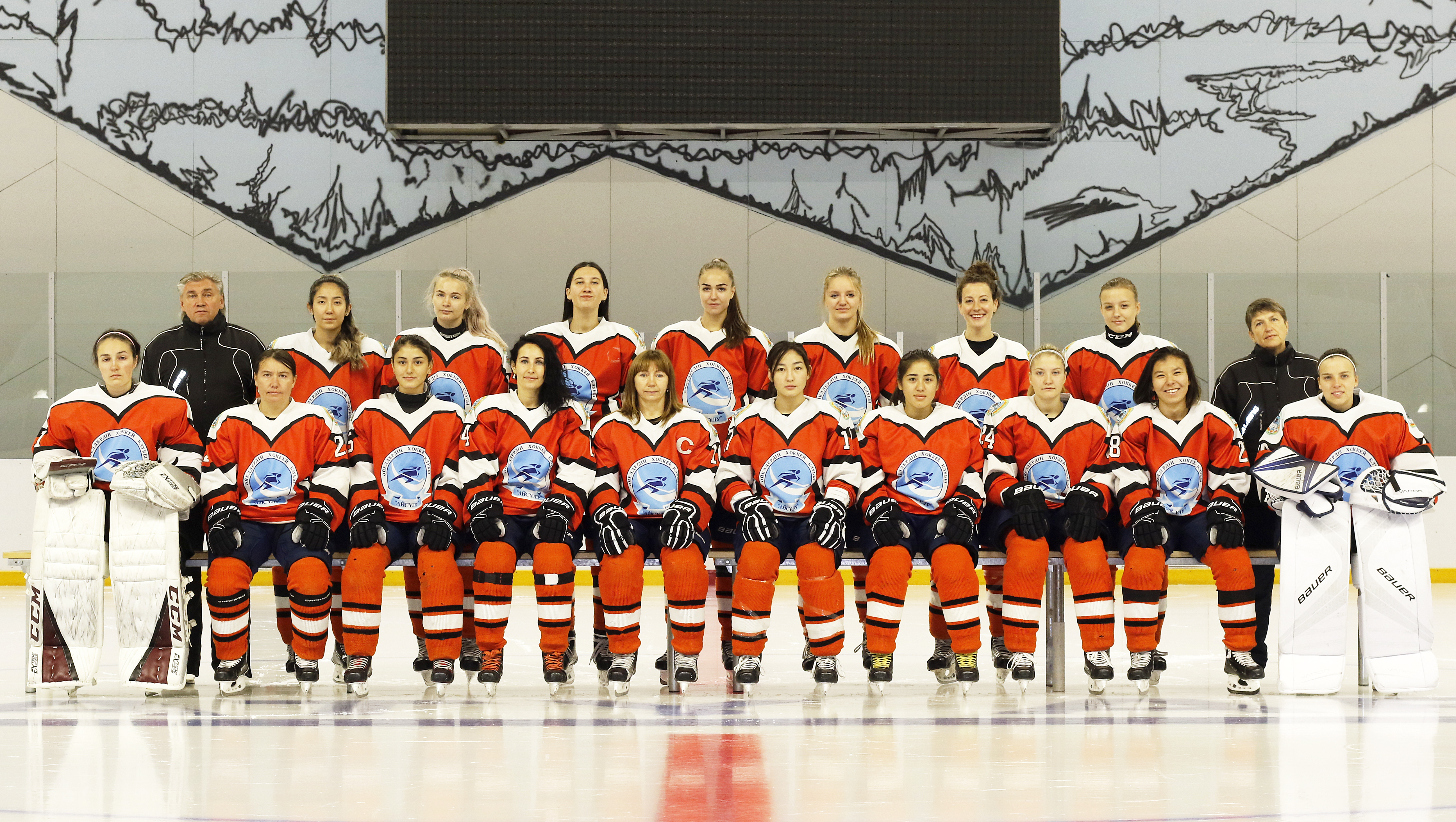 женская хоккейная команда "АЙСУЛУ", сезон 2019-2020 гг.